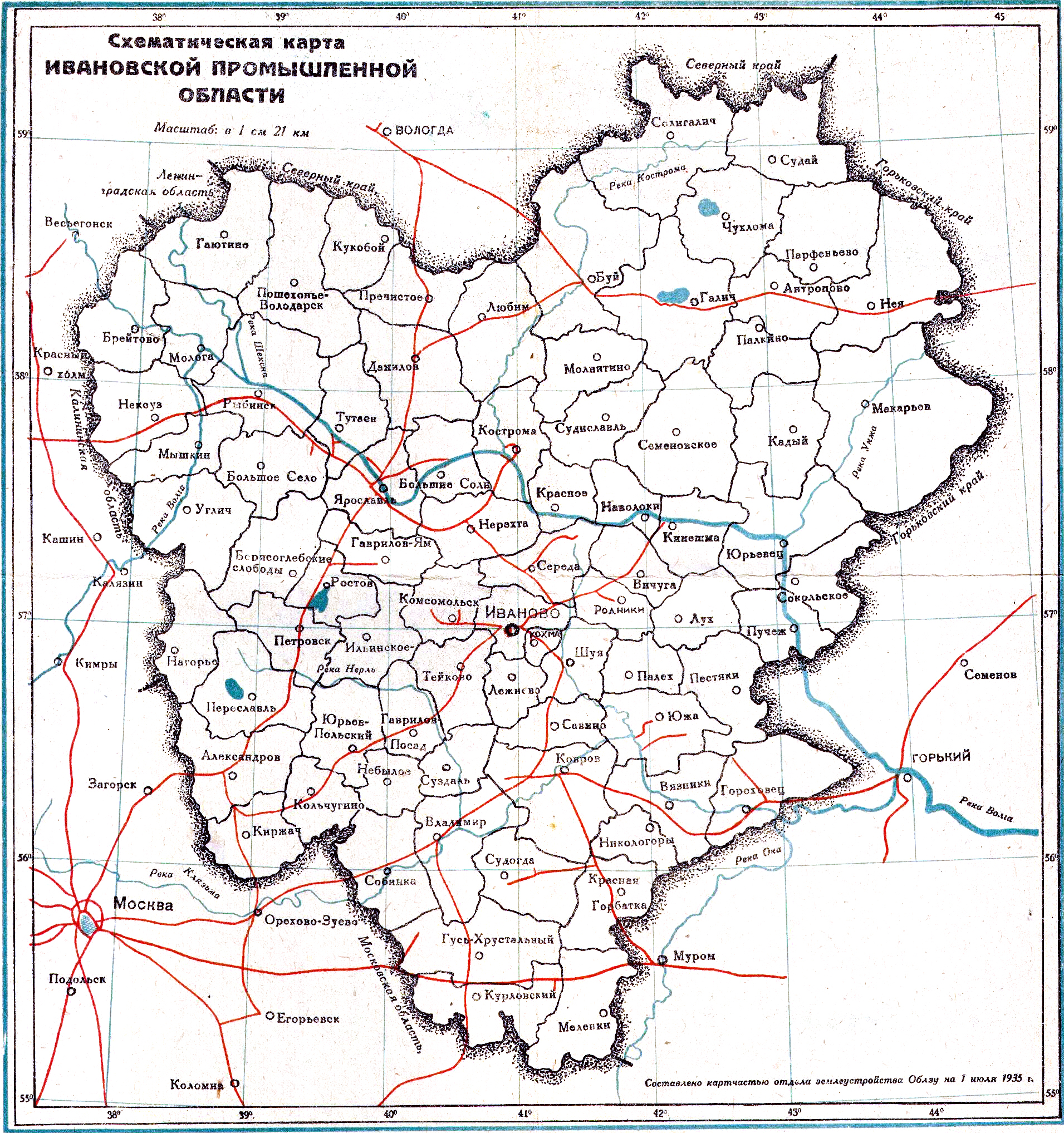 Схематическая карта Ивановской промышленной области. Масштаб: в 1 см 21 км